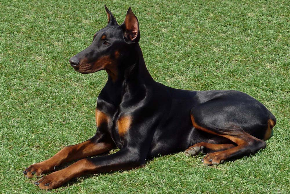 Dans cette attitude, le Dobermann Fangio fait immanquablement penser à Anubis, dieu de la mythologie égyptienne…